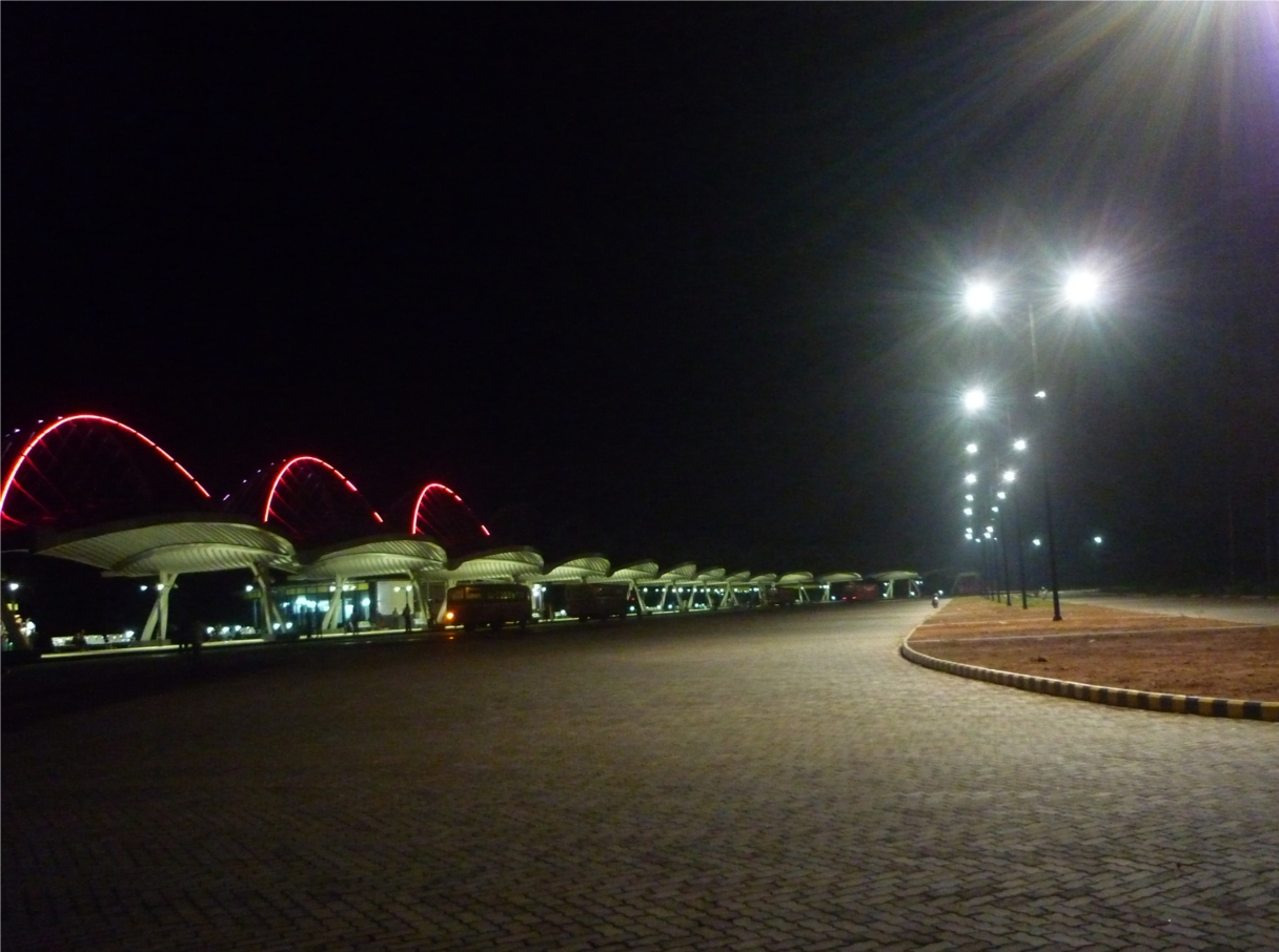 വൈറ്റിലയിലെ ബസ് ടെര്‍മിനല്‍, രാത്രി ദൃശ്യം